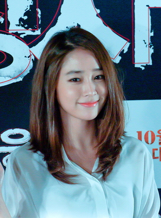 131024 '응징자' VIP 시사회 이민정 직찍